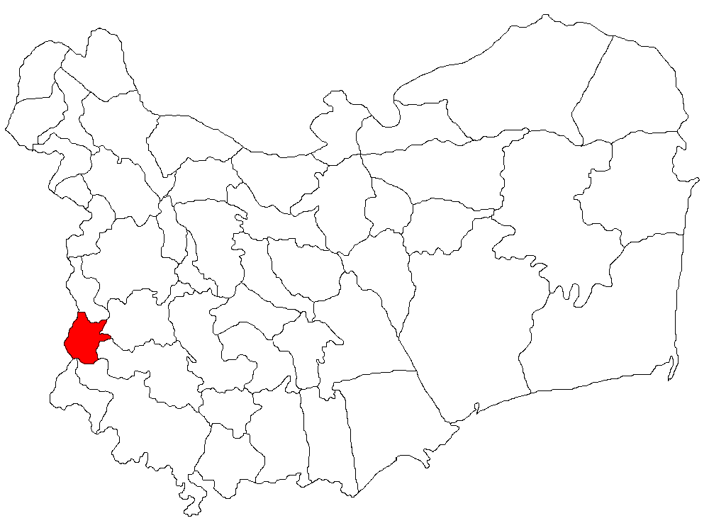 Categorie:Hărţi ale judeţului Tulcea